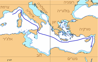 אוניית המעפילים לטרון - מסלול